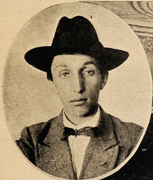 Daniel de la Vega (Quilpué, 30 de junio de 1892 - Santiago de Chile, 29 de julio de 1971) fue un poeta, dramaturgo, cronista y novelista chileno.